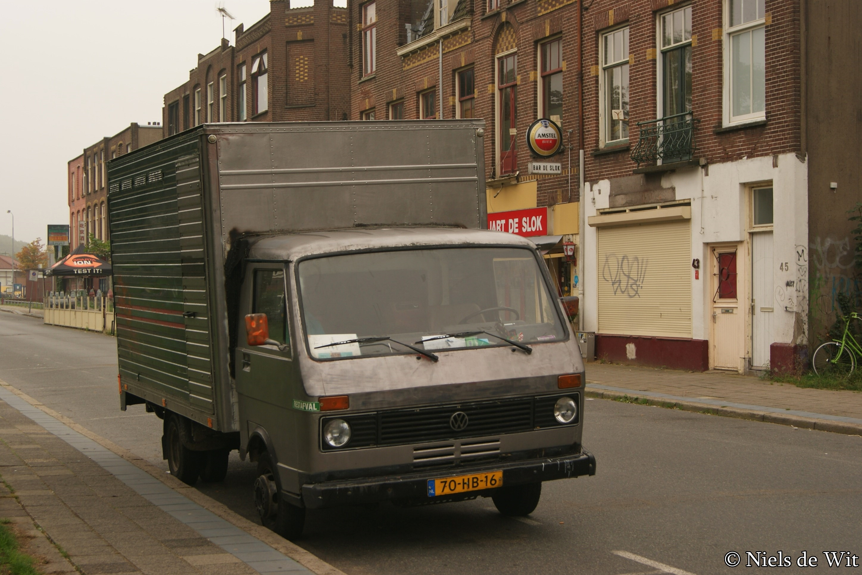 70-HB-16